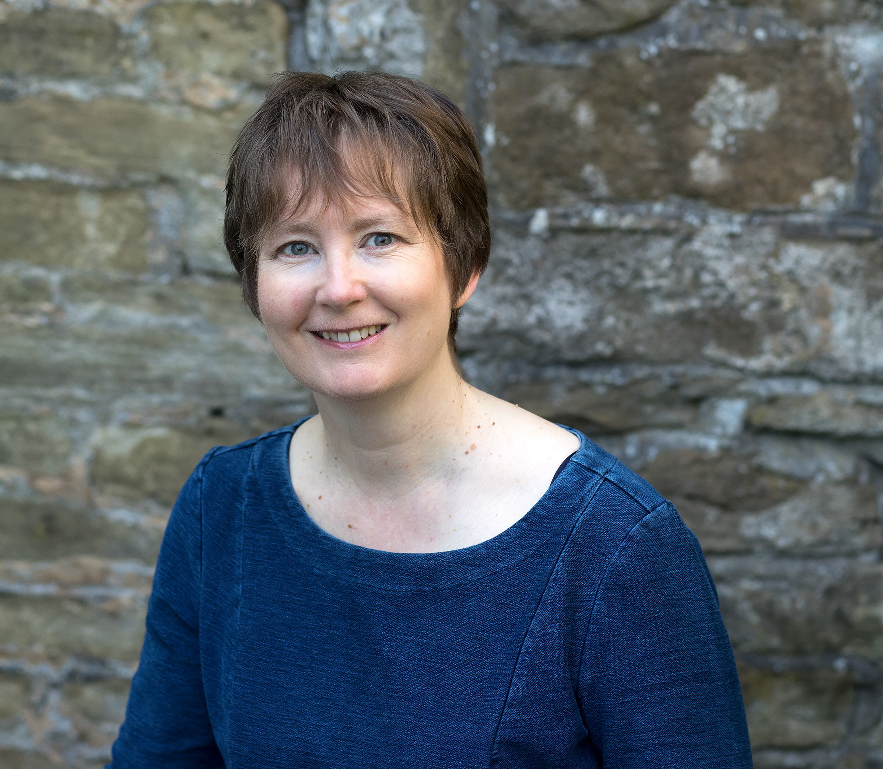 Linda Green